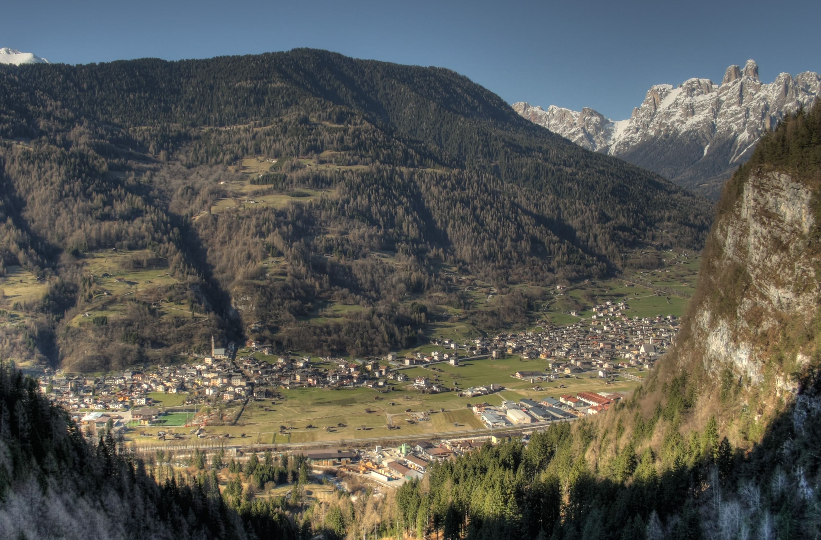 Panoramica dalla Val Noana dei Comuni di Imèr e Mezzano